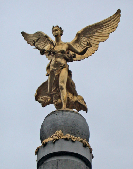 Francia, Reims, Fontaine Subé, particolare della statua